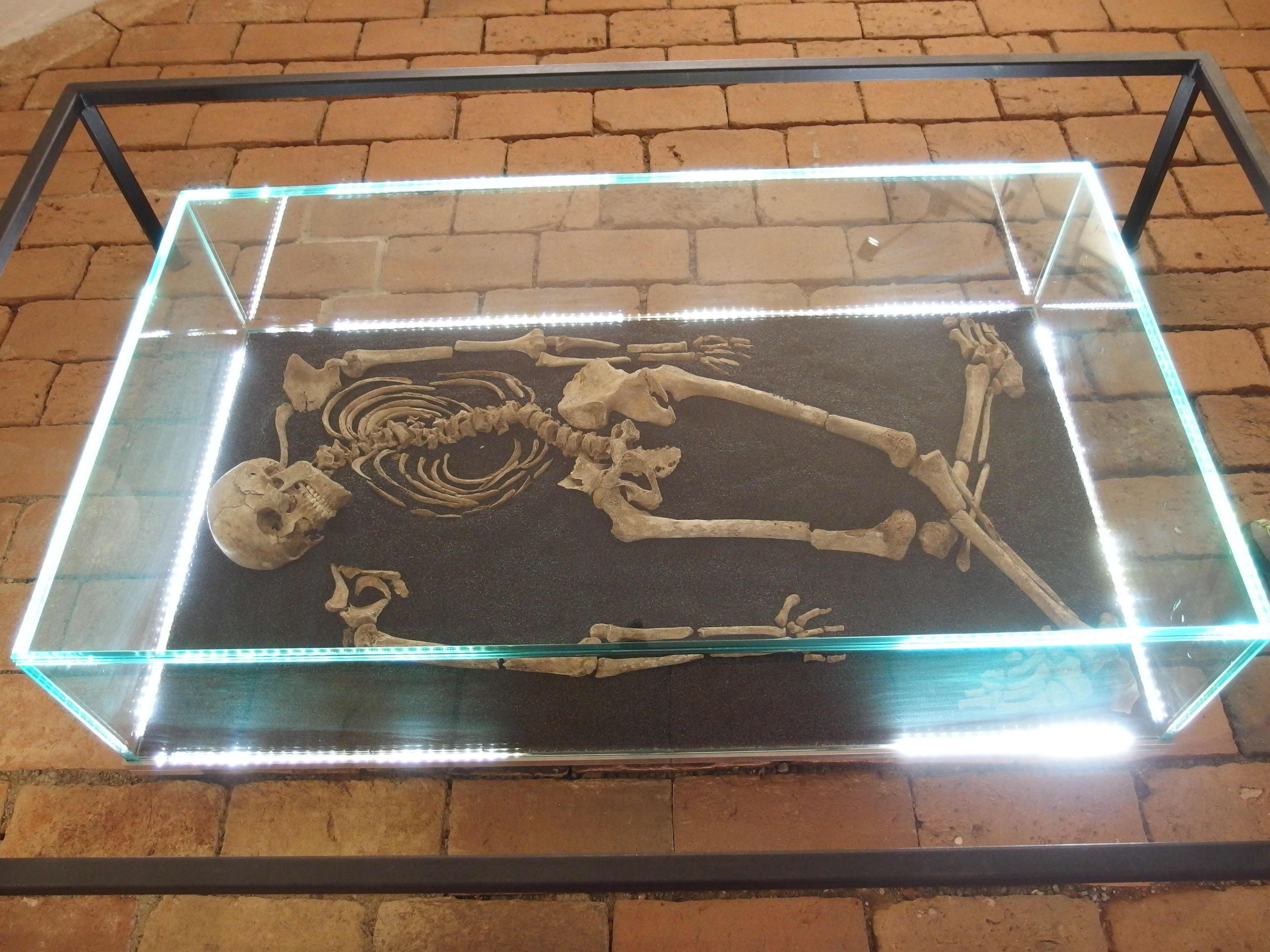 Skelett eines durch Rädern hingerichteten Mannes, etwa 25 bis 30 Jahre alt aus dem 16. bis 18 Jahrhundert; Ausgestellt der Burg Riegersburg in der Steiermark; MNr. 65610.14.01 / Parz. 1054 / FL 3 / DOF 2 / OBJ. 17 / FUND-NR. 65 vom 27.08.2014